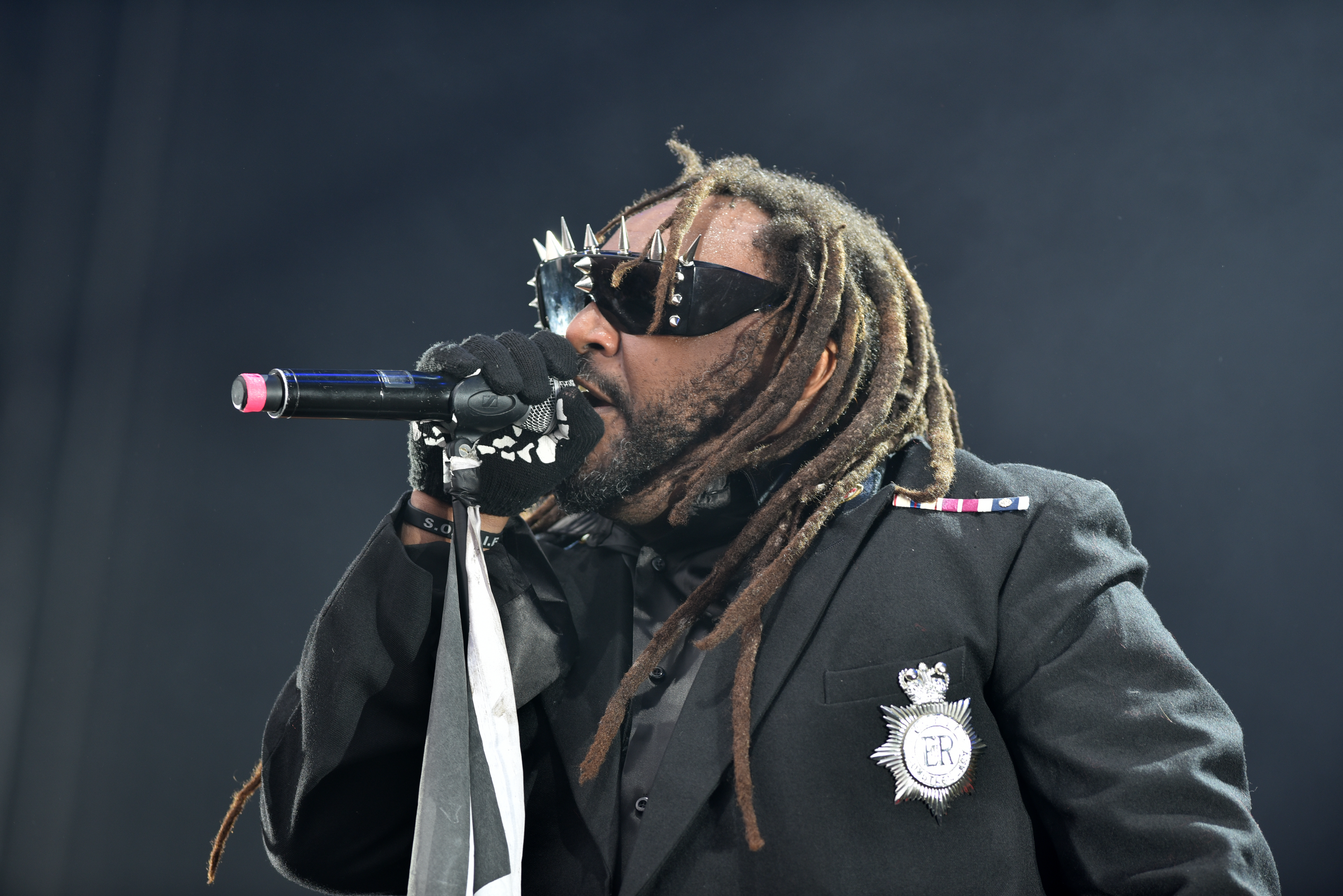 Skindred auf dem Reload Festival 2017